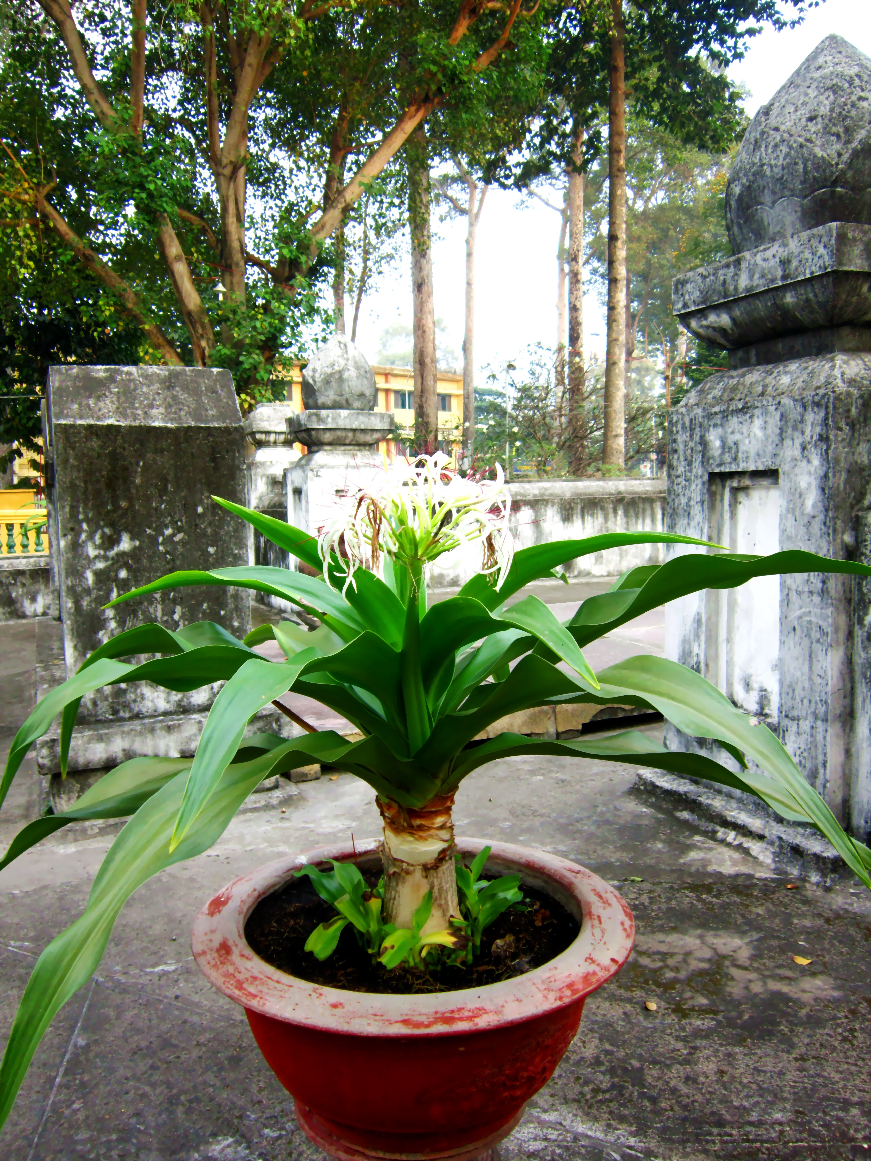 Cây náng hay đại tướng quân (Crinum asiaticum) được trồng trước mộ Tả quân Lê Văn Duyệt ở Lăng Ông Bà Chiểu, Sài Gòn, Việt Nam..